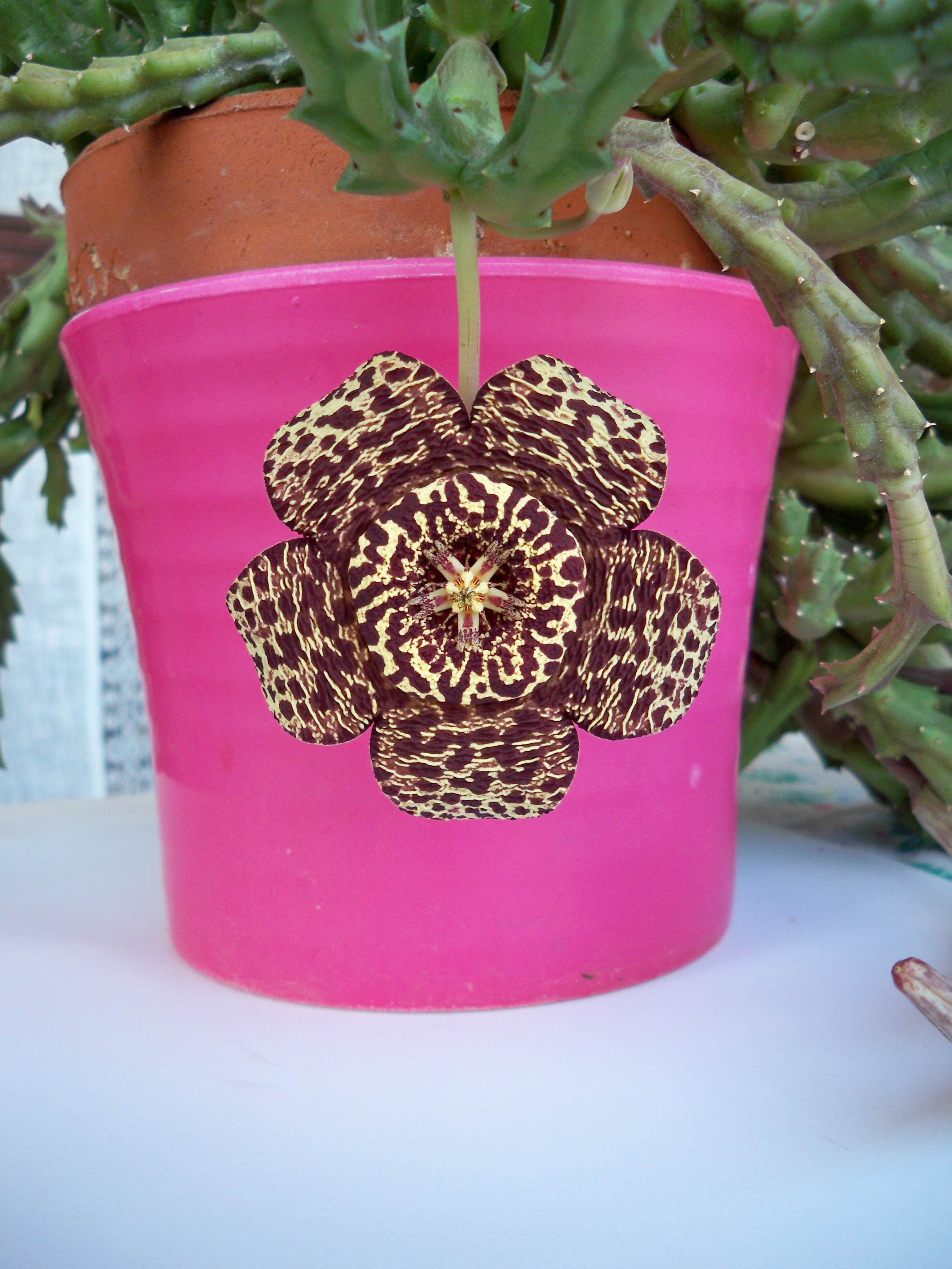 Fiore di Stapelia lepida